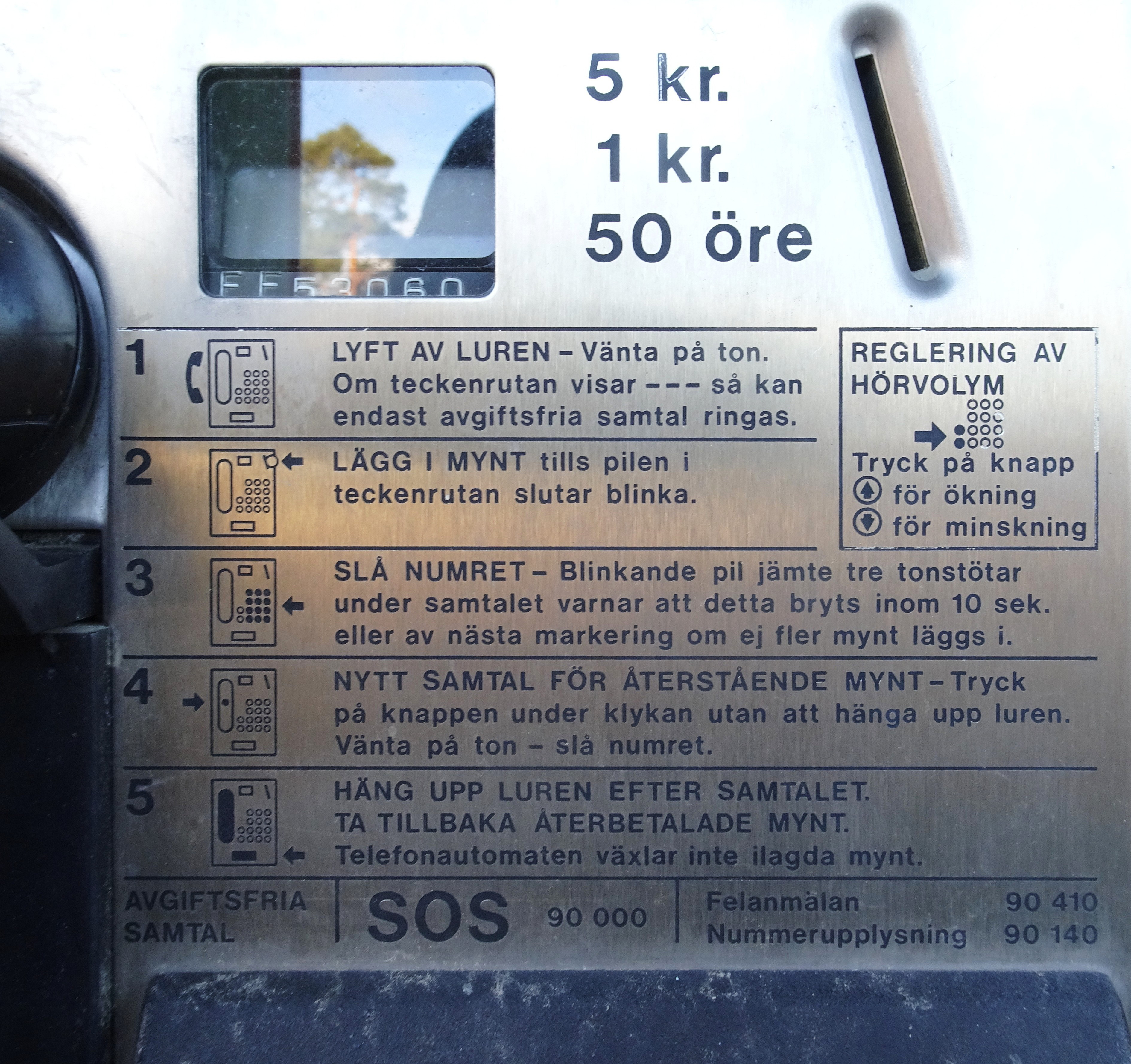 Mynttelefon bruksanvisning